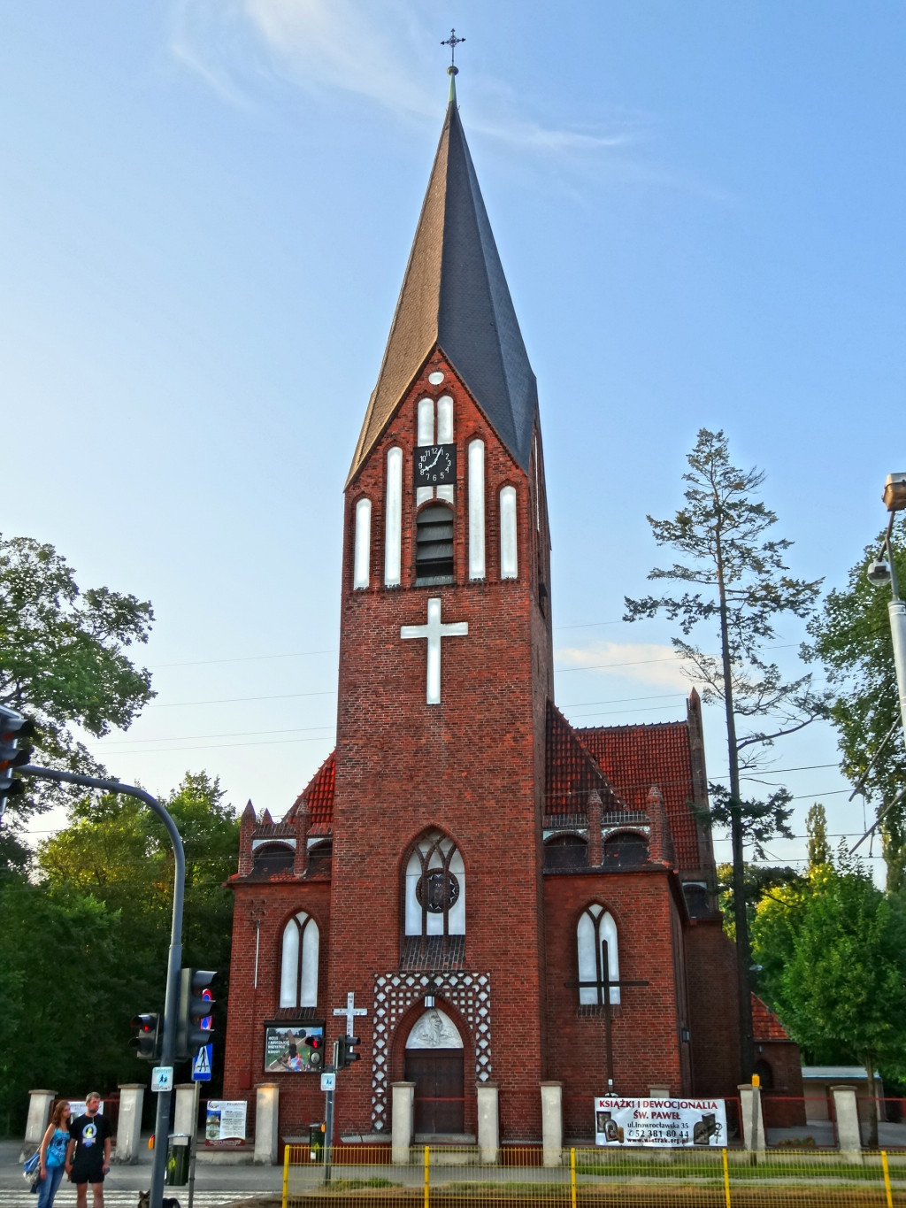 Kościół p.w. Miłosierdzia Bożego w Bydgoszczy, zbud. 1903 r.